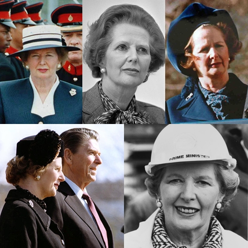 Montagem de Margaret Thatcher, com fotos do período em que era primeira-ministra.